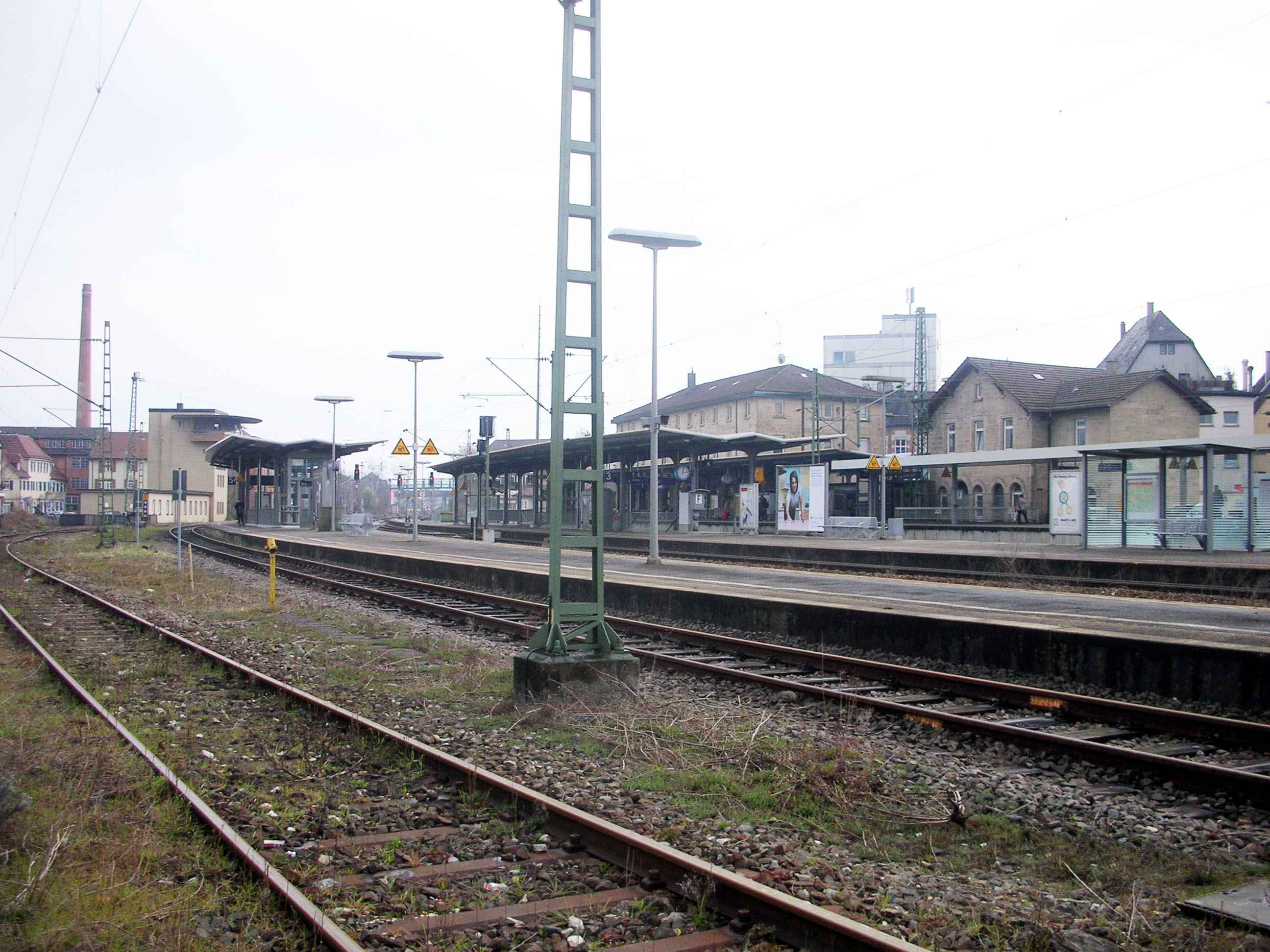 Schorndorfer Bahnhof